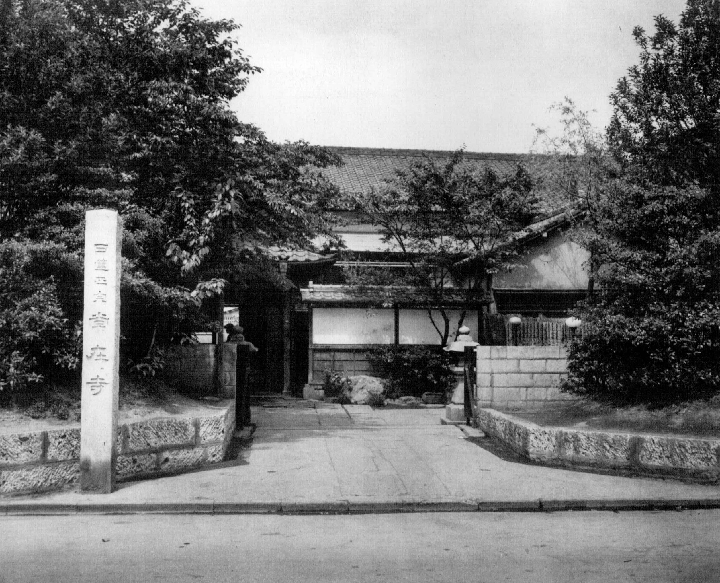 旧池袋常在寺